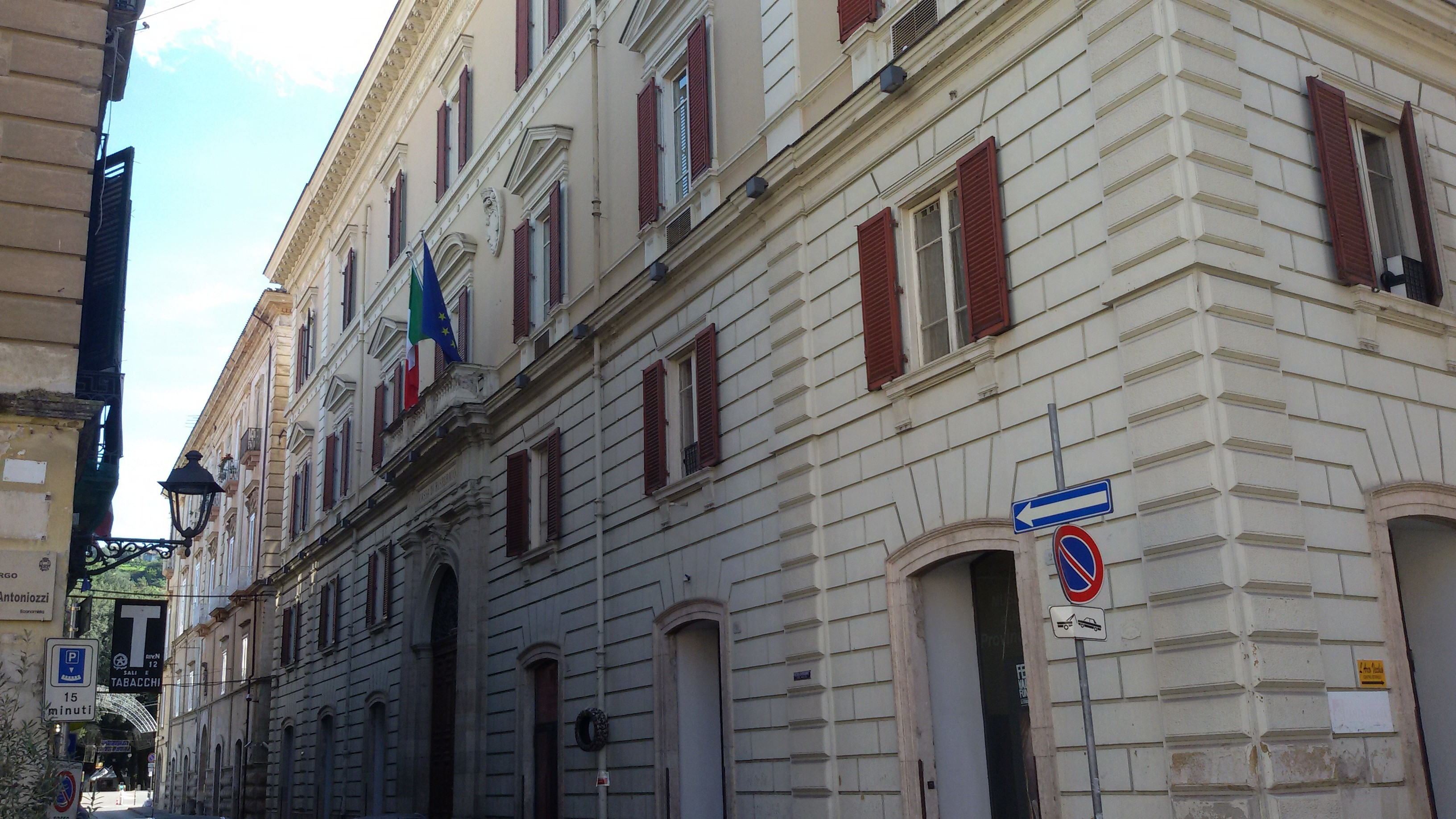 Palazzo Cassa di Risparmio del 1910 a Cosenza centro storico